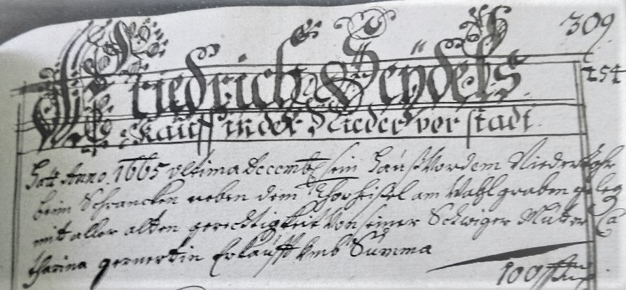 Initiale des F u. S in Stadtbuch Arnau 1665